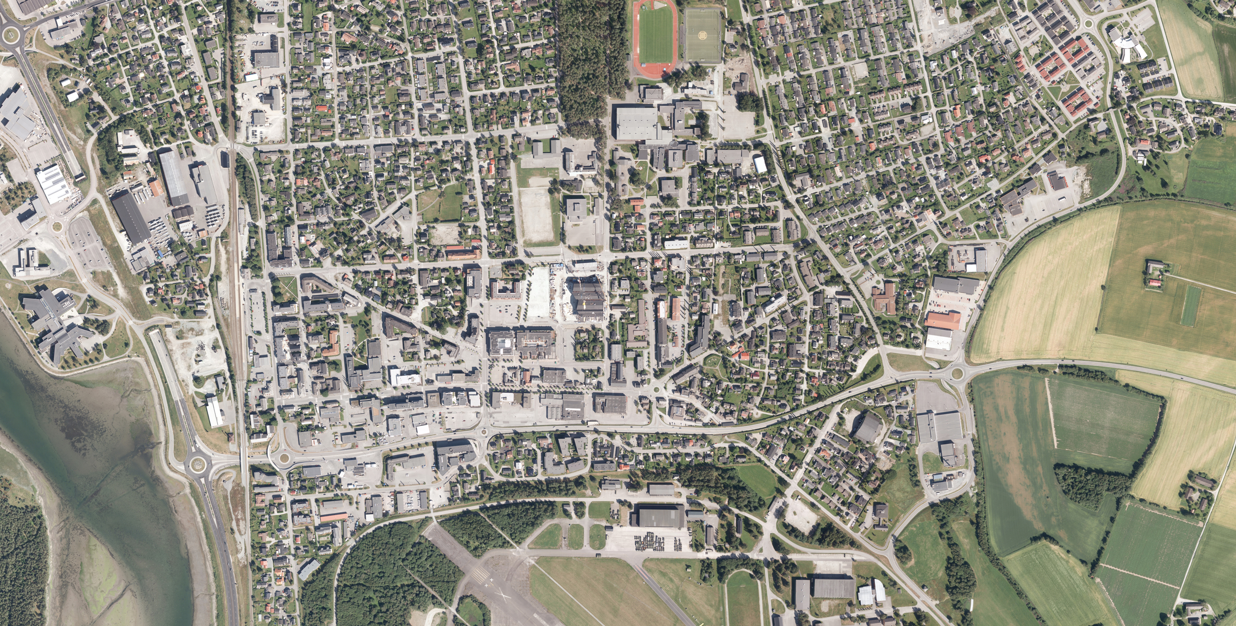 Flybilde av Stjørdalshalsen i 2014.